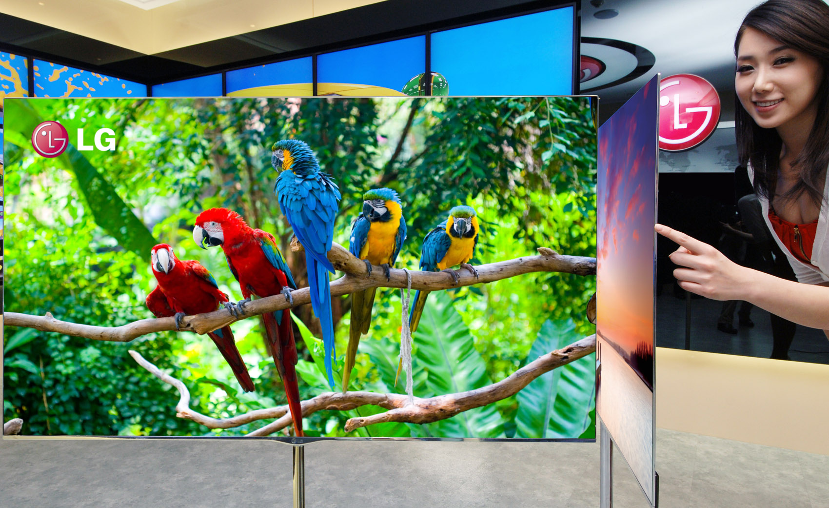 LG전자가 세계최대 크기 55인치 3D OLED TV를 공개했다. OLED TV는 화질, 디자인 모두에서 뛰어나다. 올해 국내시장에 출시된 후 해외 주요 국가 판매도 이어진다. ※ LG전자 뉴스룸 에서 관련 보도자료를 확인실 수 있습니다.